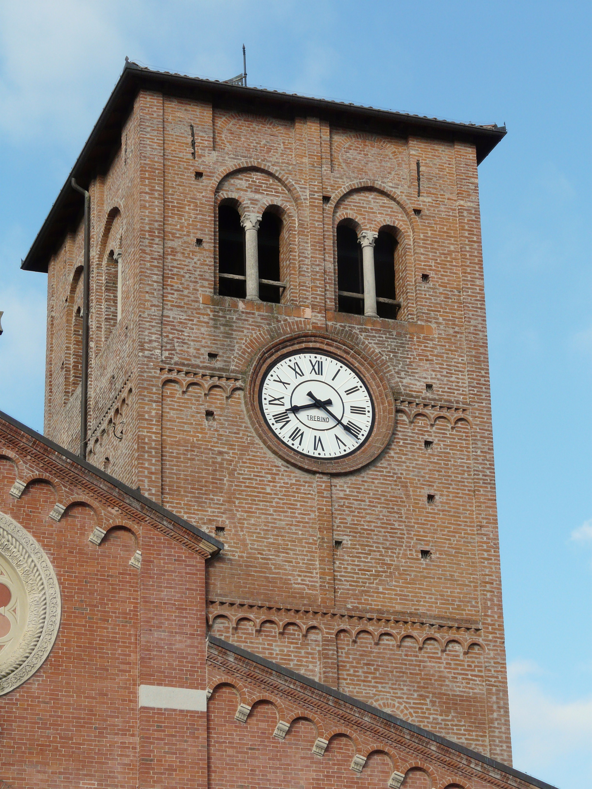 Chiesa dei Santi Pietro e Pantaleone, Bosco Marengo, Piemonte, Italia